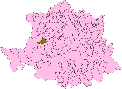 Acehuche